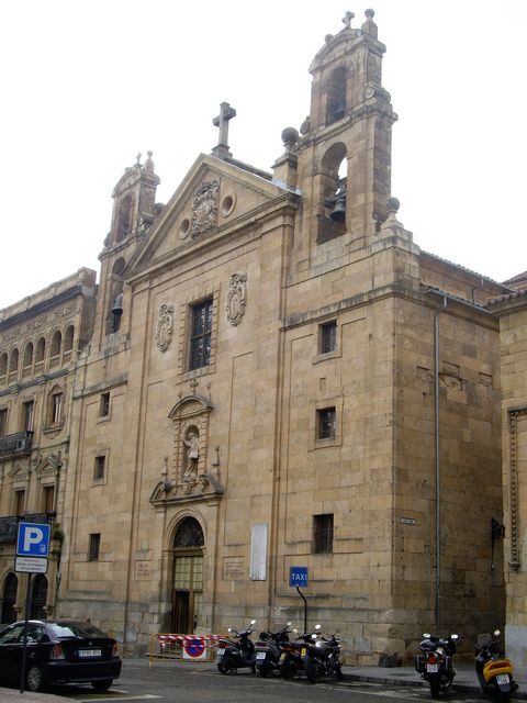 Iglesia del antiguo convento de San Elías. Salamanca